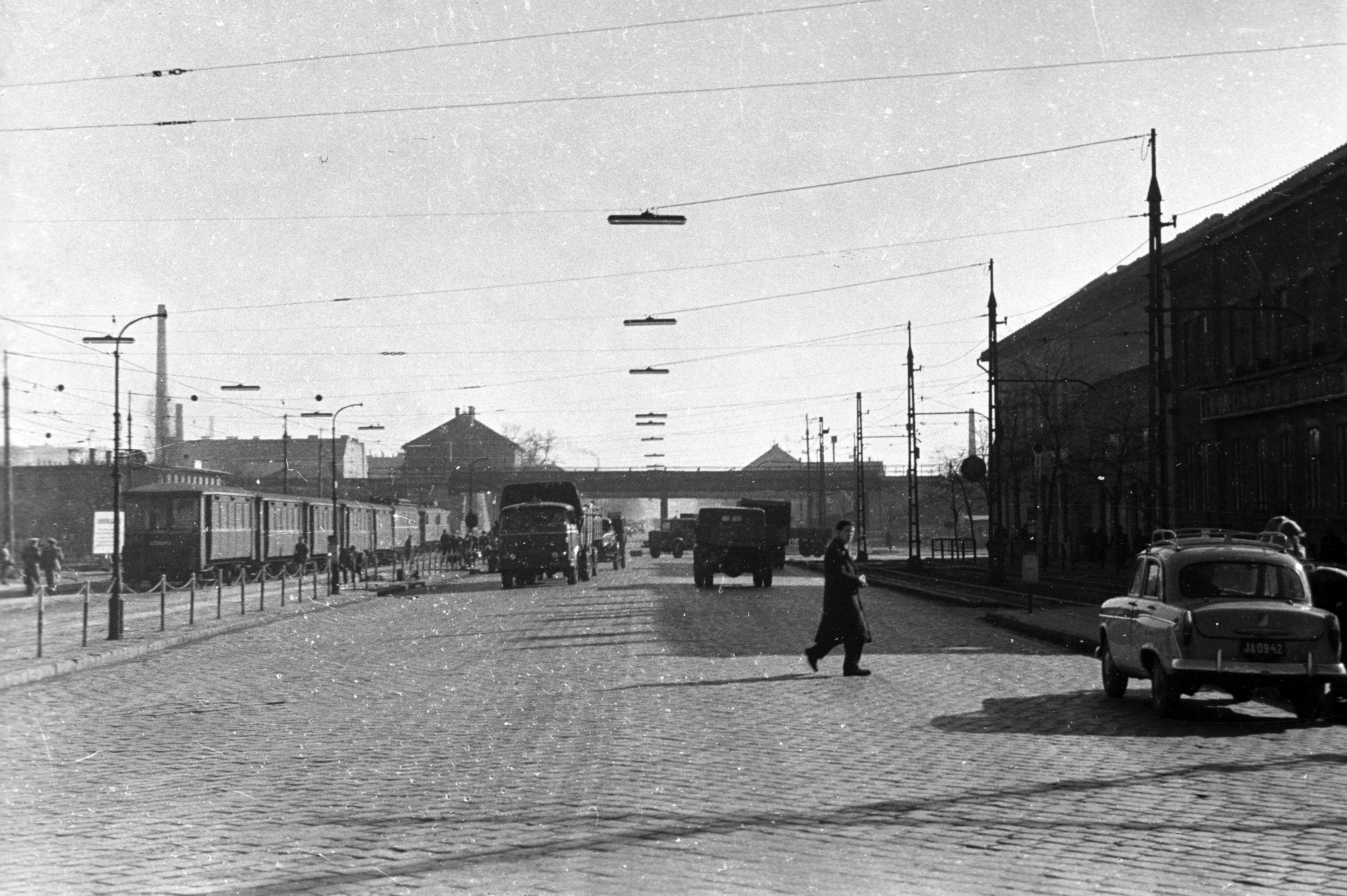 Soroksári út, a vasúti felüljáró előtt a Kvassay Jenő út kereszteződése. Location: Hungary, Budapest IX. Tags: commuter train, taxicab, Budapest Title: Soroksári út, a vasúti felüljáró előtt a Kvassay Jenő út kereszteződése.